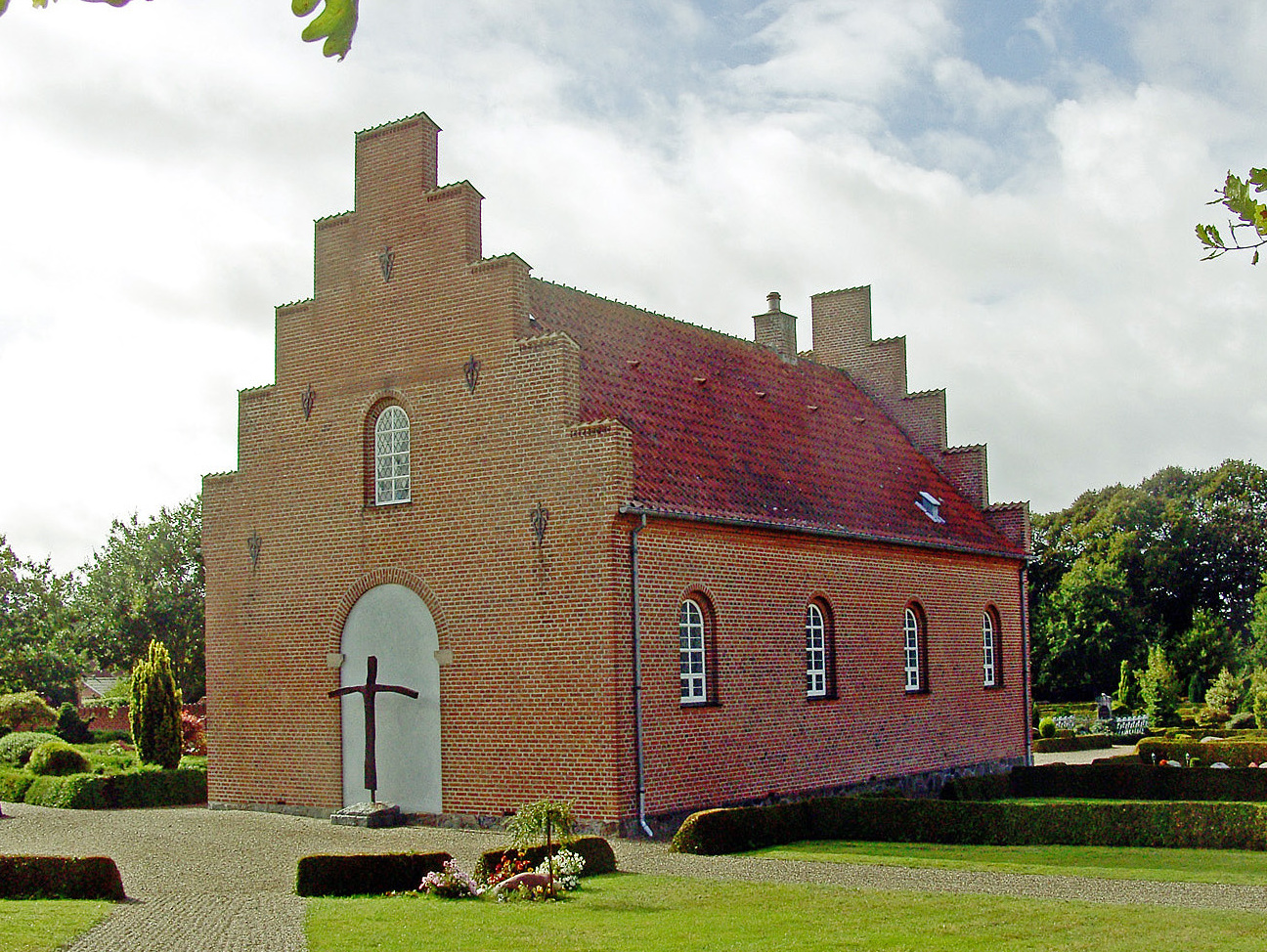 fra sydøst